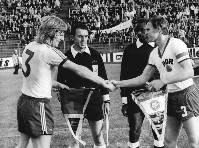 ADN-ZB-Mittelstädt-15.6.74-ma-BRD-Hamburg: X. Fußball-Weltmeisterschaft-1. Finalrunde, Gruppe 1: DDR – Australien 2:0 (am 14.6.74) Begrüßung der beiden Mannschaftskapitäne vor dem Spielbeginn. Rechts: Bernd Bransch (DDR), links: Peter Wilson (Australien). 2.v.r. Schiedsrichter N Diaye (Senegal).